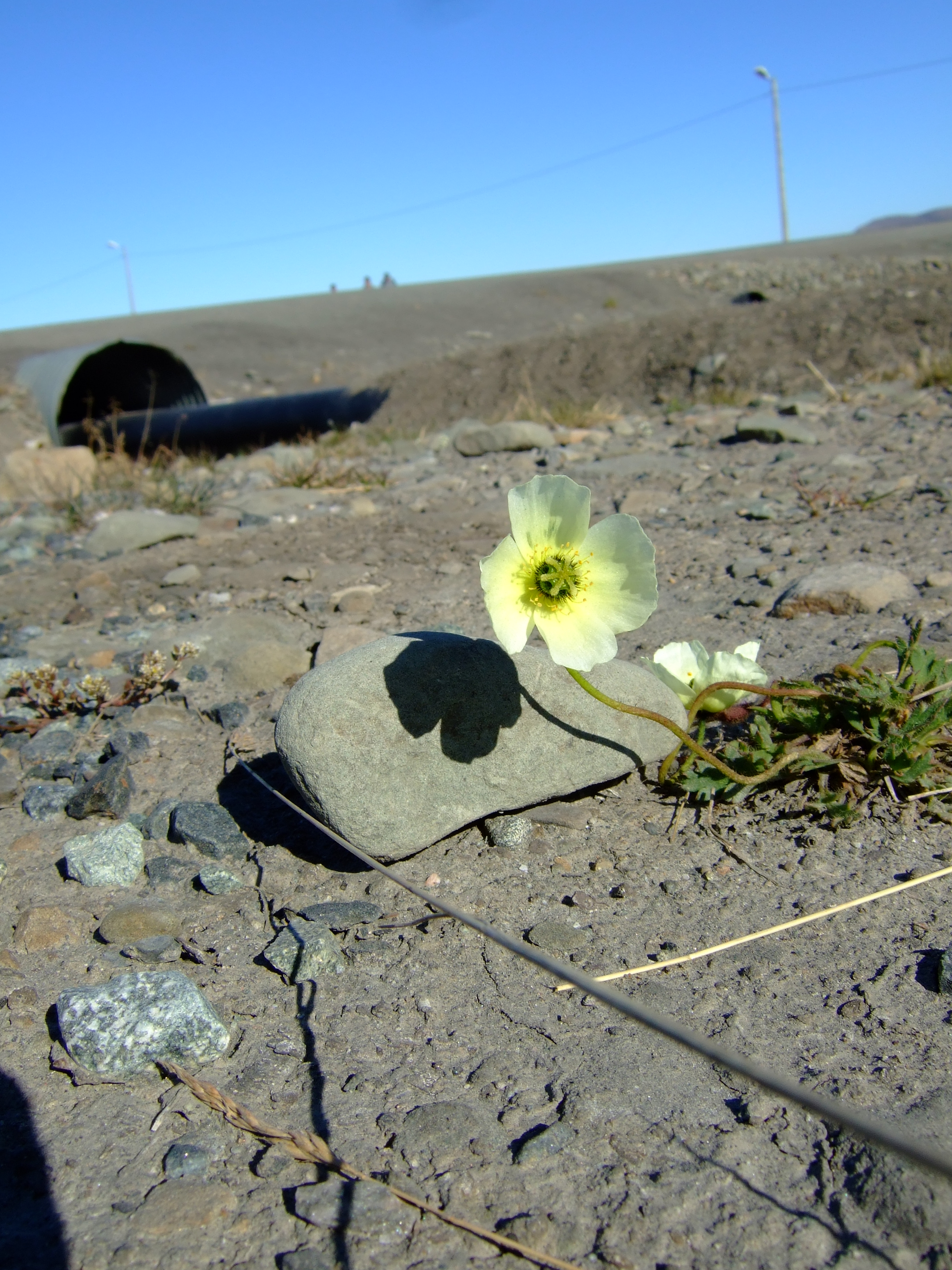 Flower of Spitzbergen